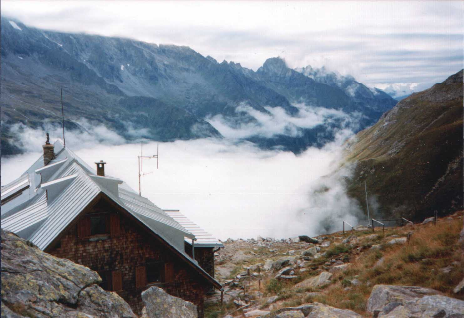 Abends an der Kasseler Hütte**